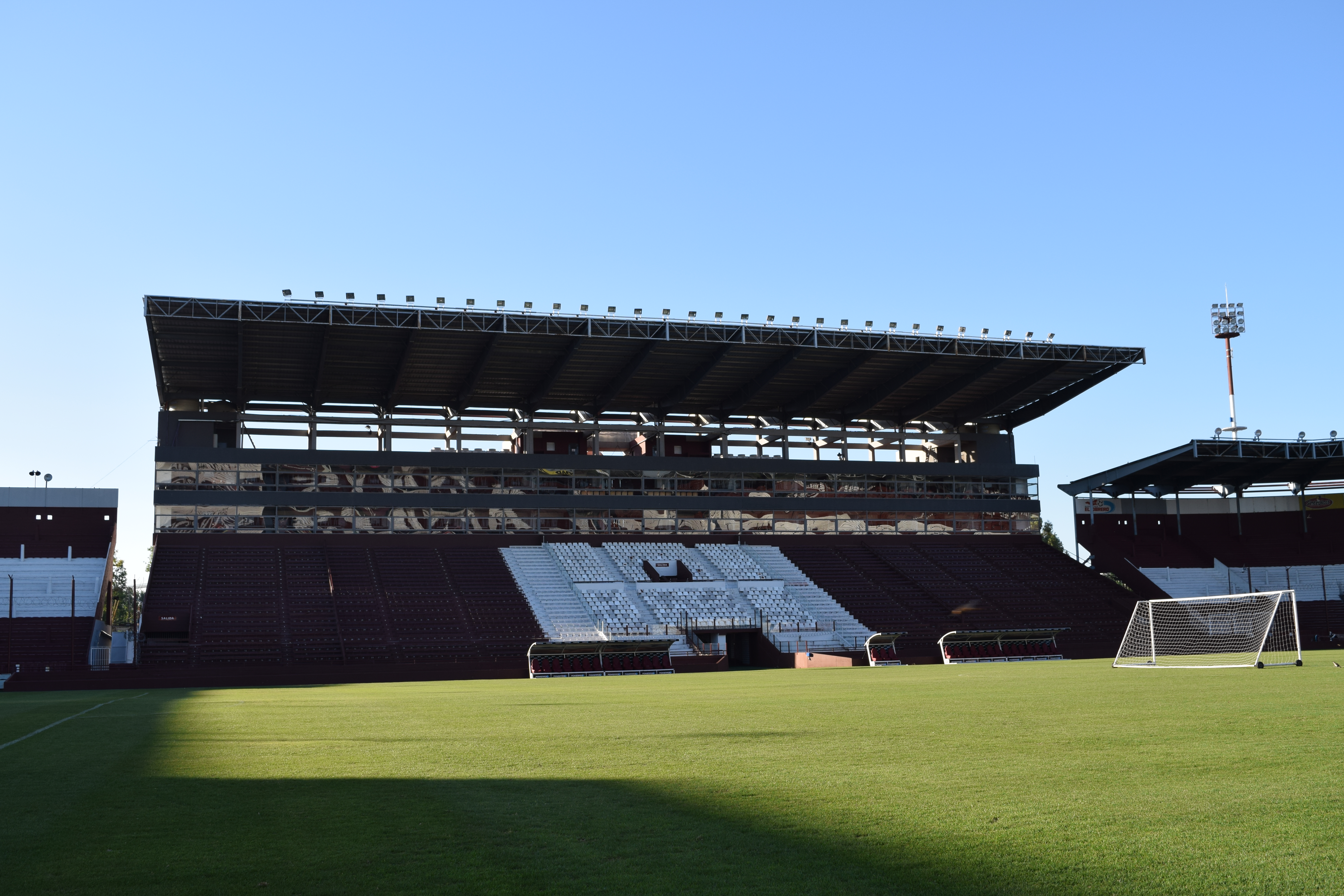 Platea principal del Estadio Ciudad de Lanús - Néstor Díaz Pérez. Incluye la platea central, la norte, la sur y los palcos. Detrás se encuentran la sede social y el estacionamiento